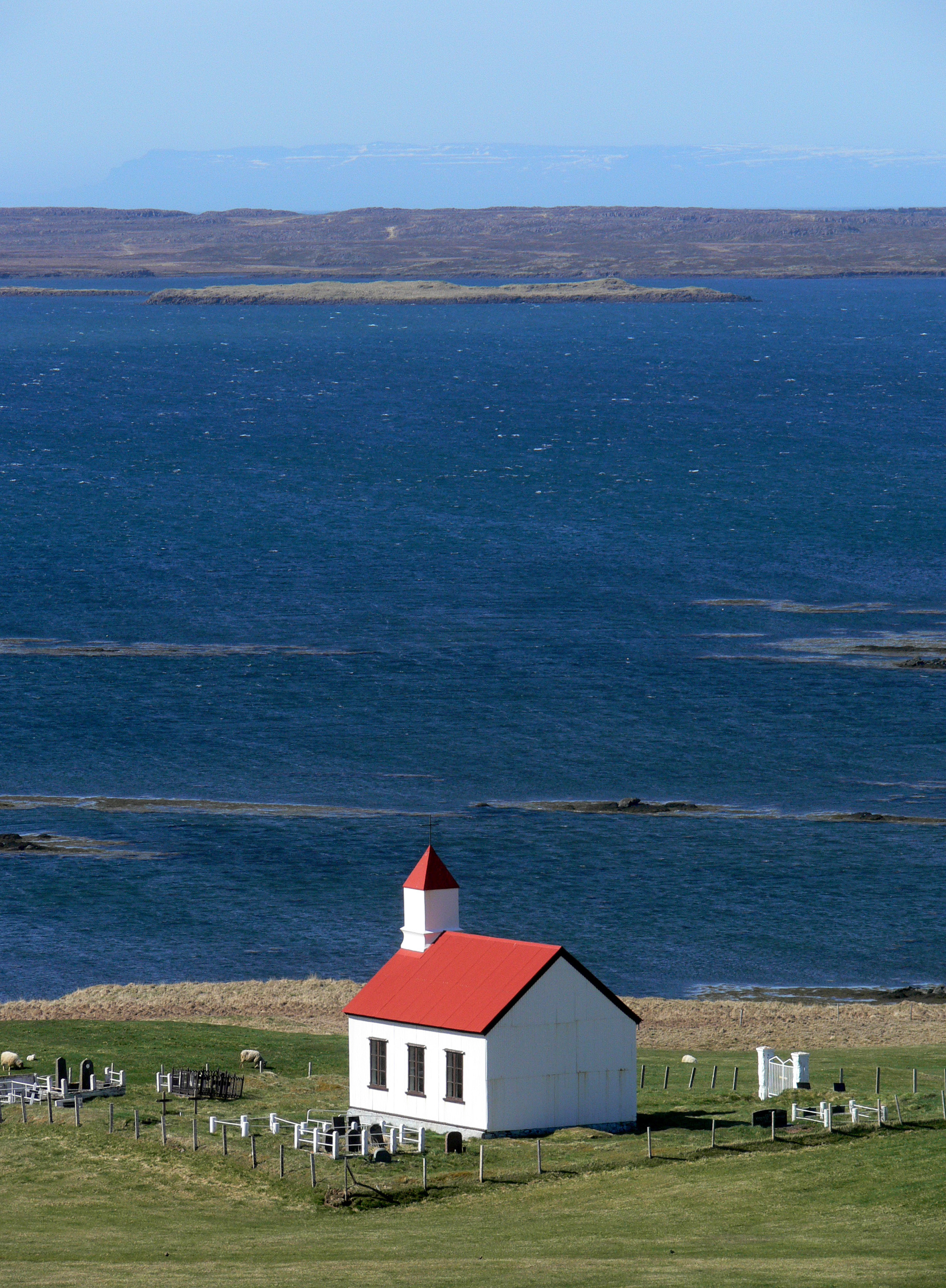 Die Kirche Narfeyri am Álftafjörður (Snæfellsnes), einem Seitenarm des Breðafjörður.